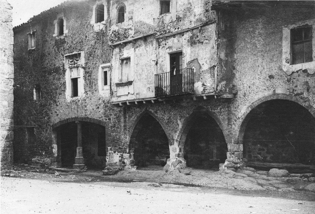 Firal dels bous de Santa Pau. Cèsar August Torras i Ferreri (Entre 1890 i 1923)